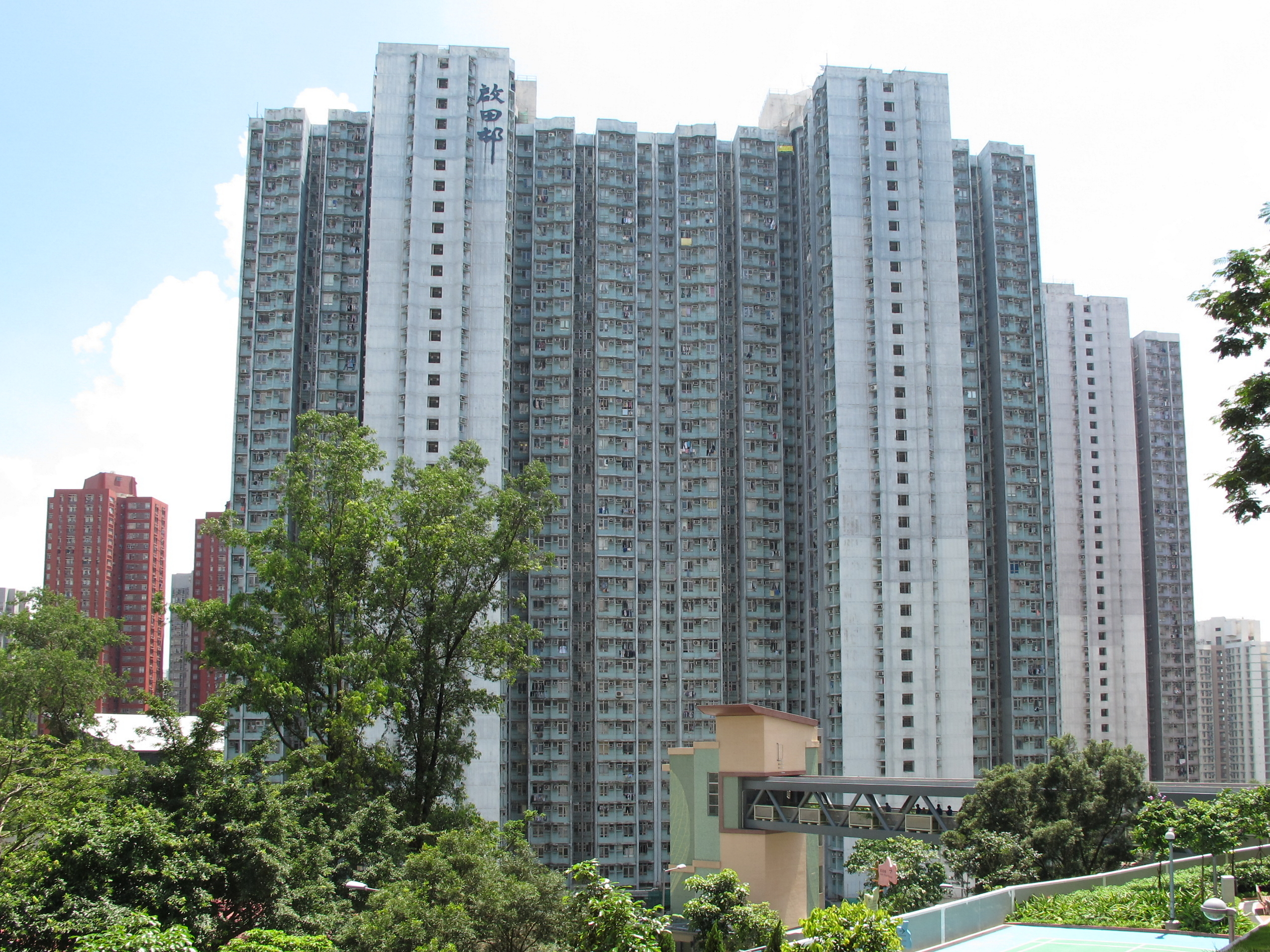 Kai Tin Estate 啟田邨